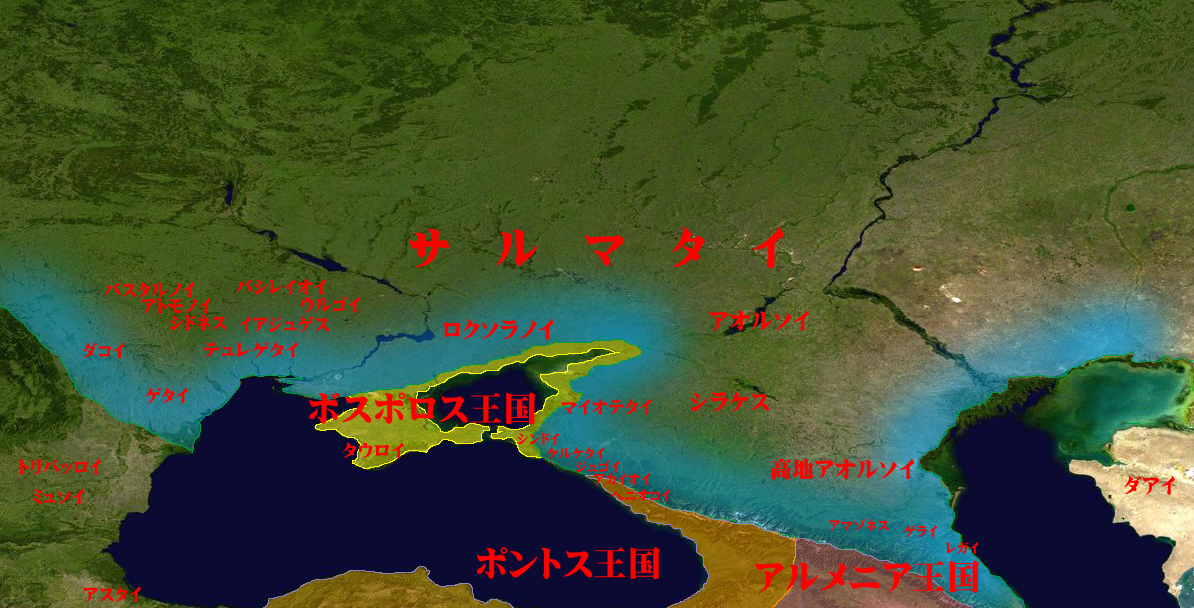 紀元前3世紀から紀元前1世紀あたりの黒海周辺地図